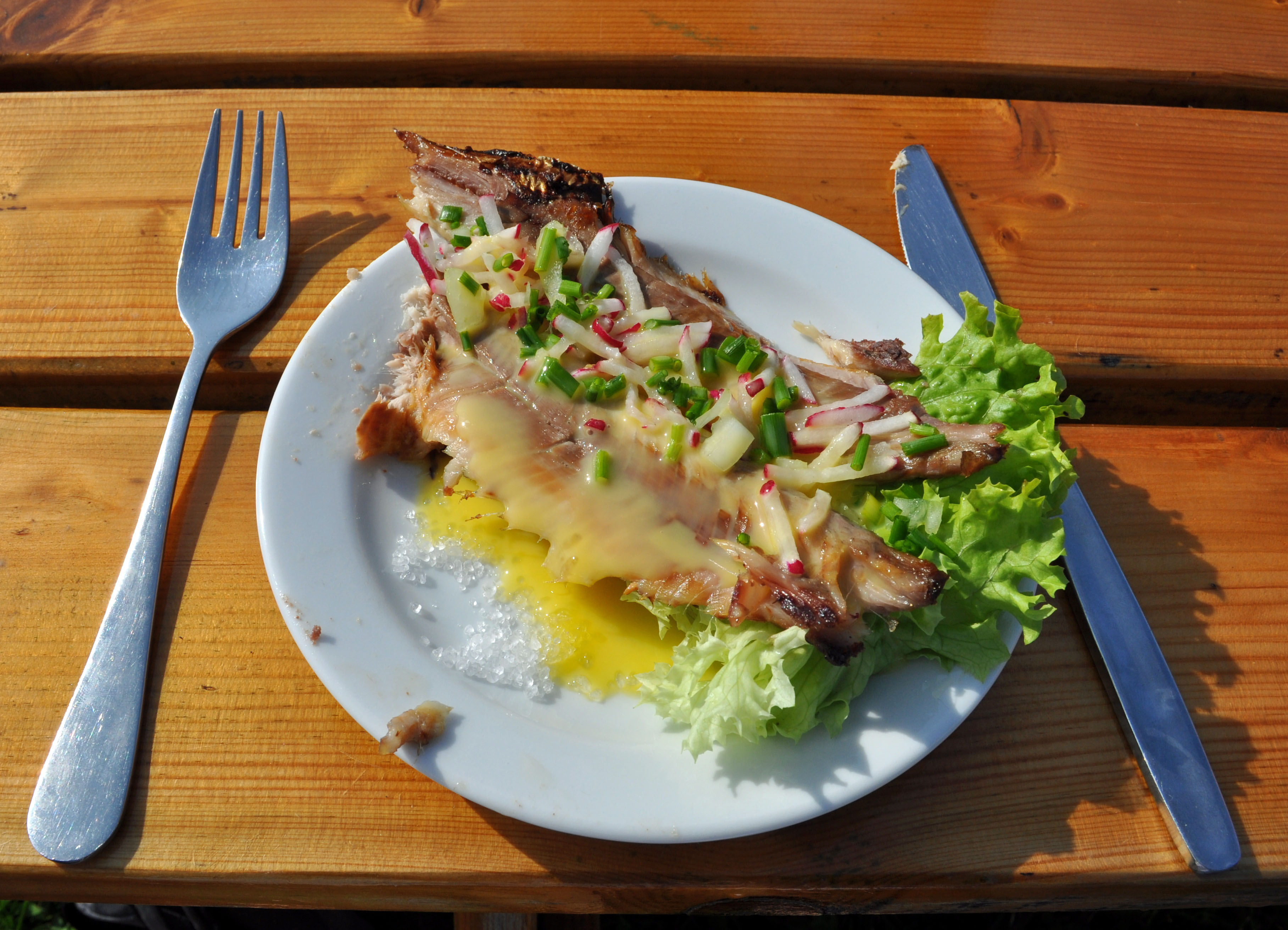 Sol over Gudhjem, Bornholm (2012-07-05), by Klugschnacker in Wikipedia